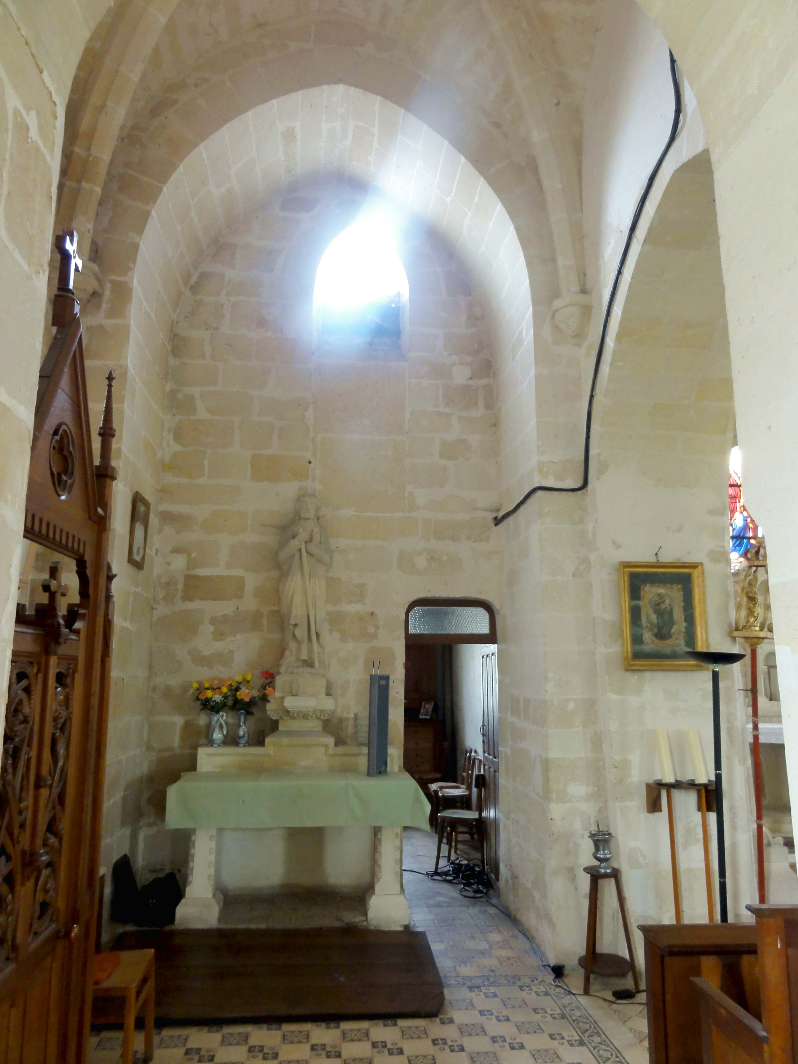 Intérieur de l'église - voir titre.